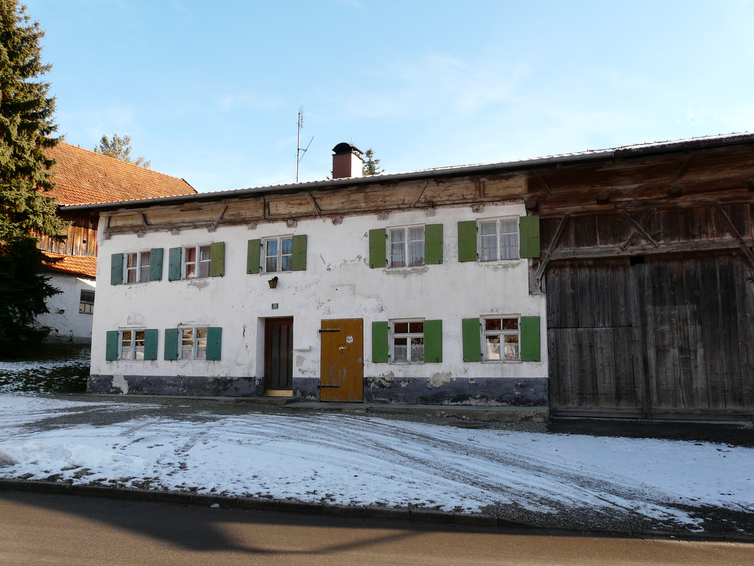 Brunnenstr. 12, Altensteig, Dirlewang